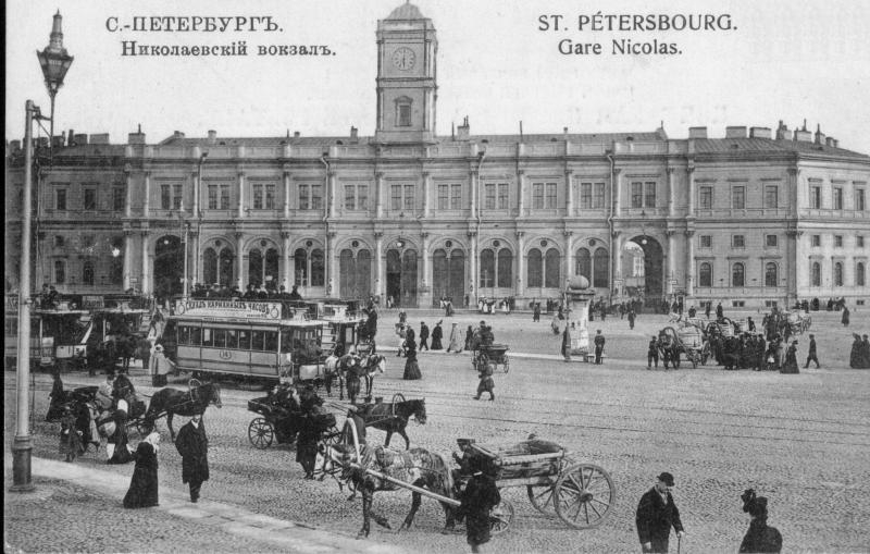 Московский железнодорожный вокзал на дореволюционной открытке